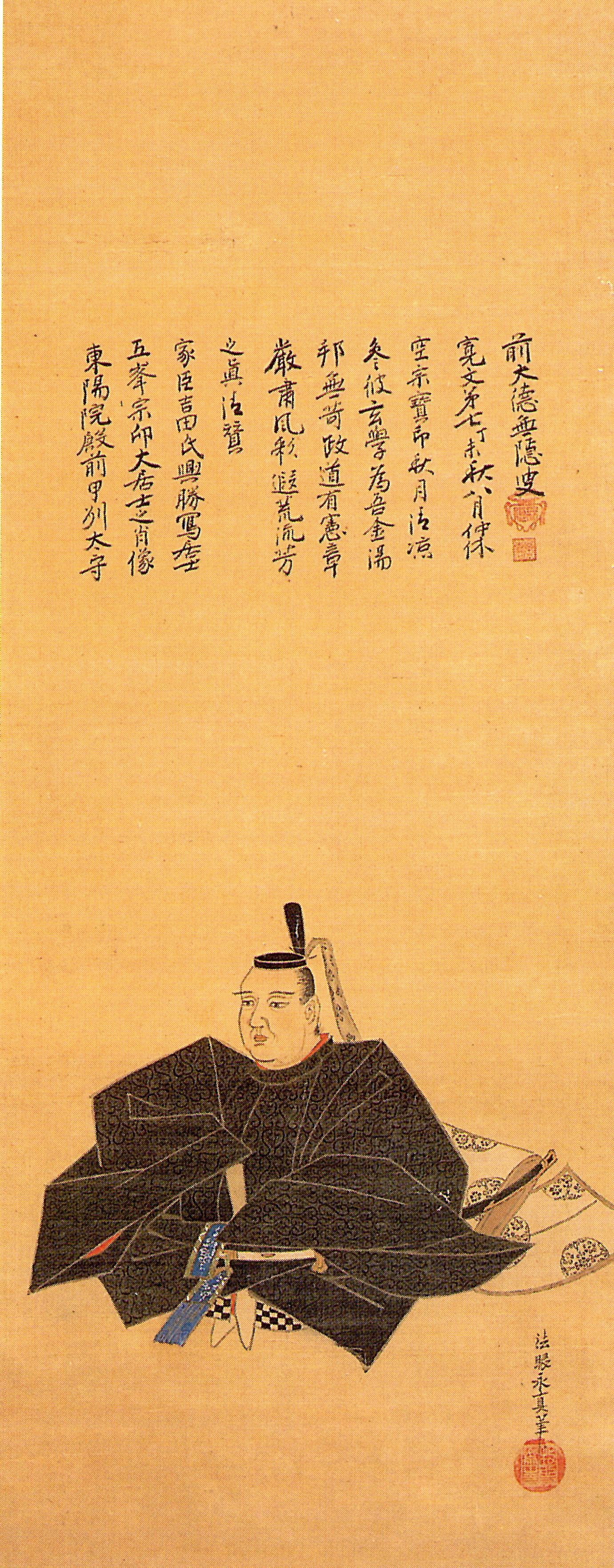 黒田長興の肖像。